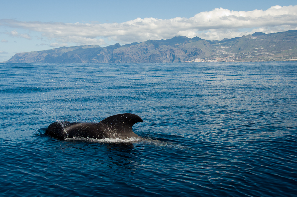 Calderón tropical frente a la costa de Tenerife